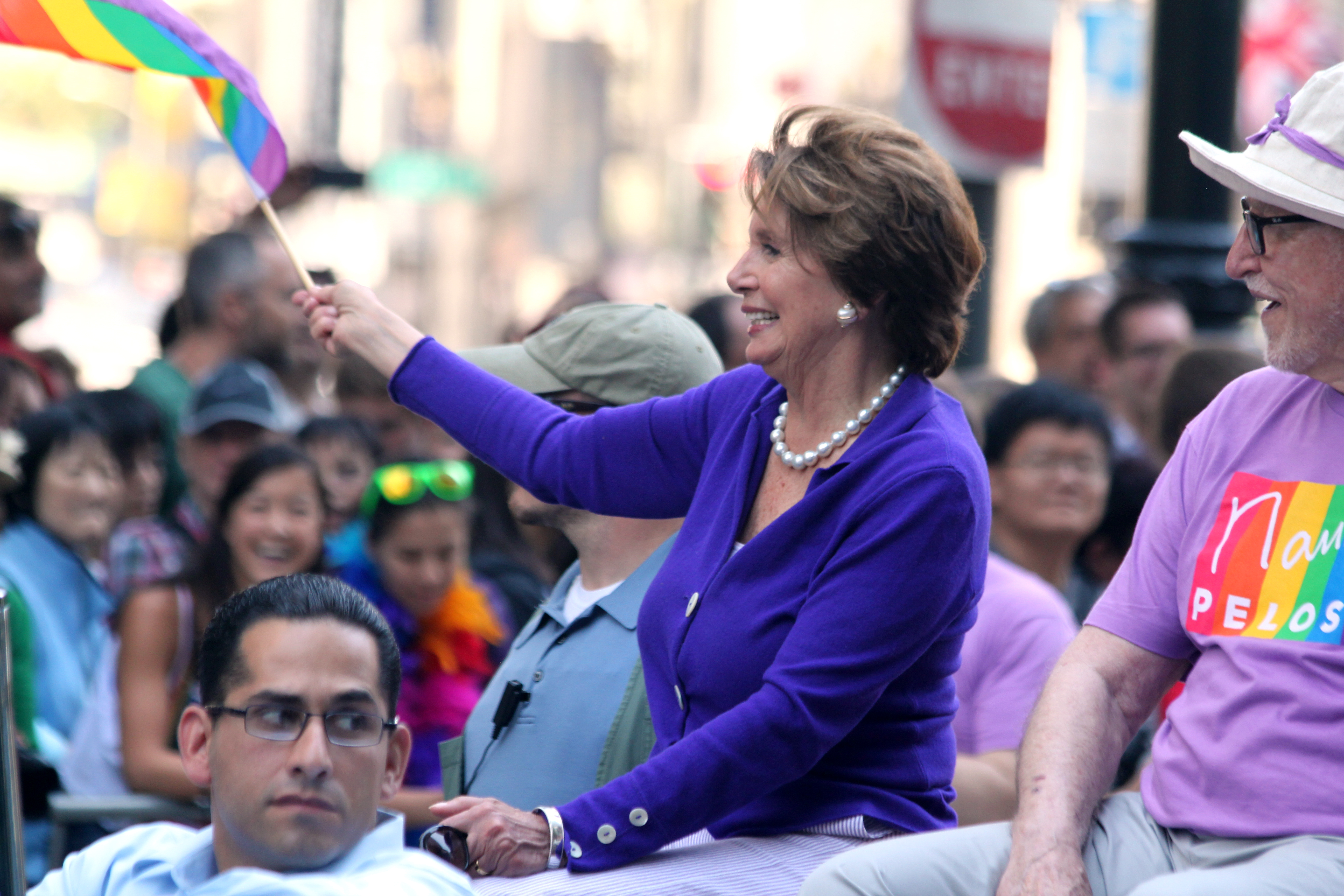 Nancy Pelosi